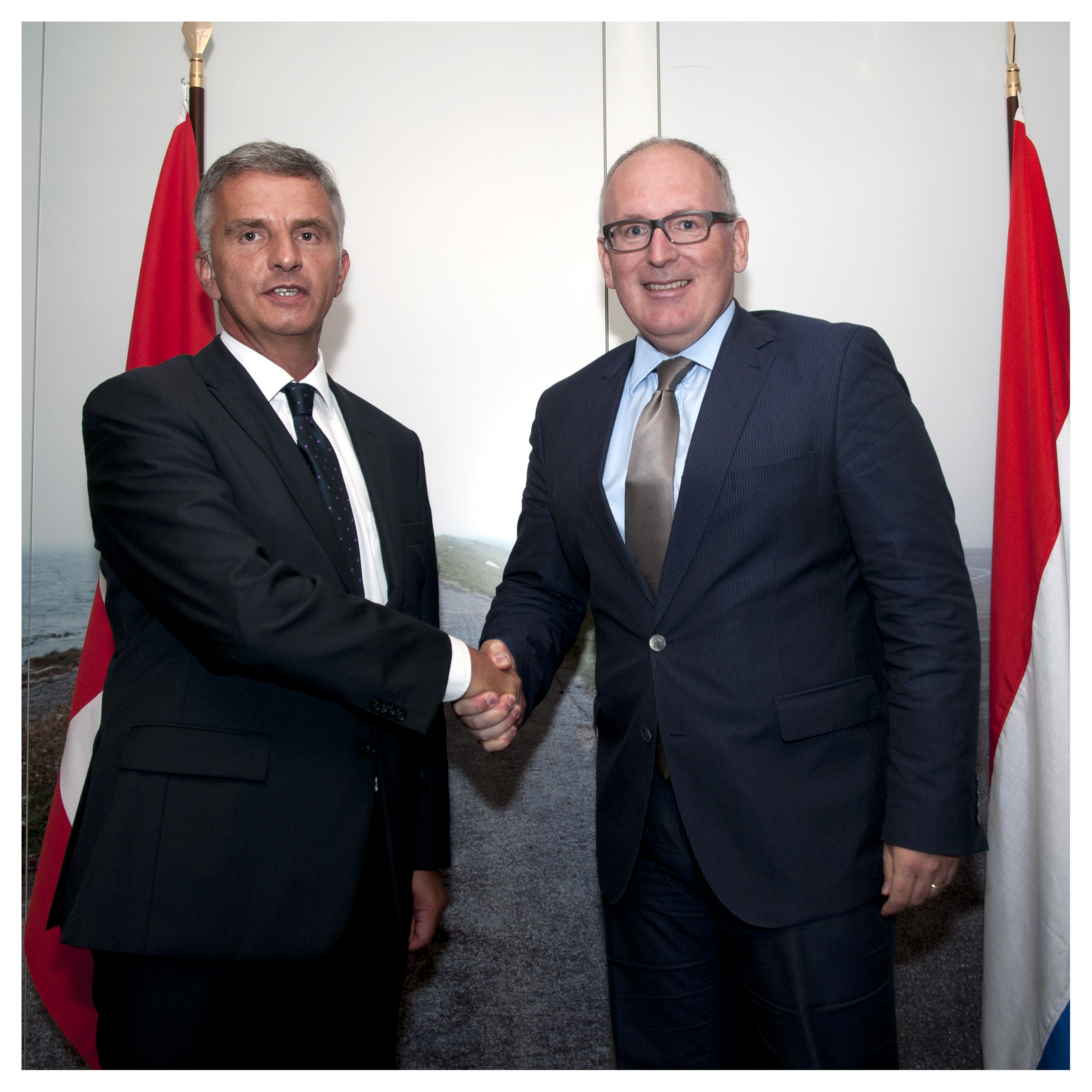 130826 Burkhalter Zwitserland bij Timmermans 4523